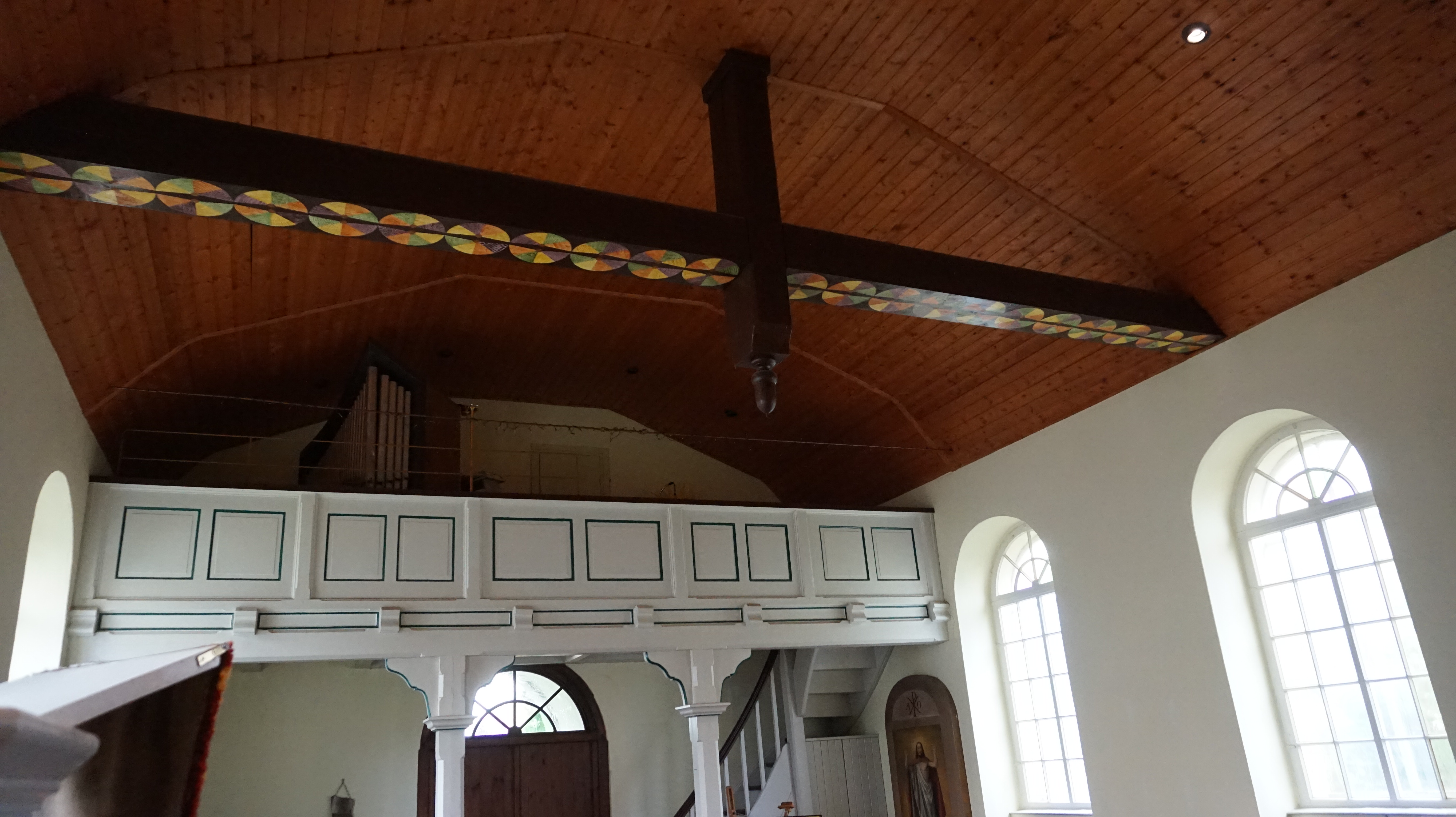 Empore der Hoffnungskirche Neu Hartmannsdorf mit kleiner Orgel.